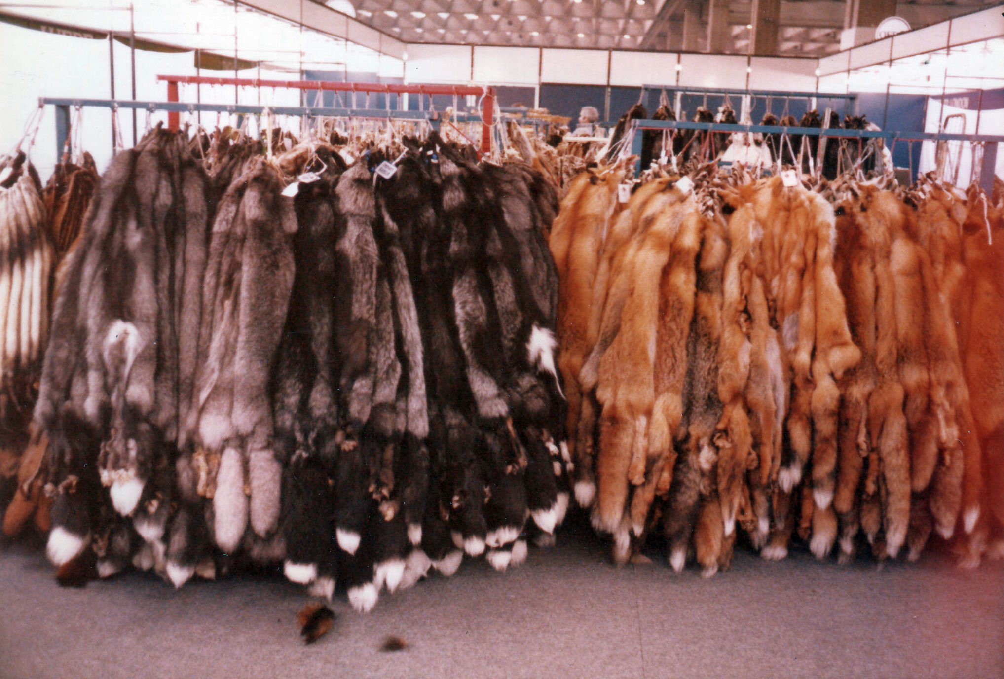 Messestand der Ofra Pelzhandelsgesellschaft, Murrhardt und Frankfurt am Main, auf der Frankfurter Pelzmesse 1981.